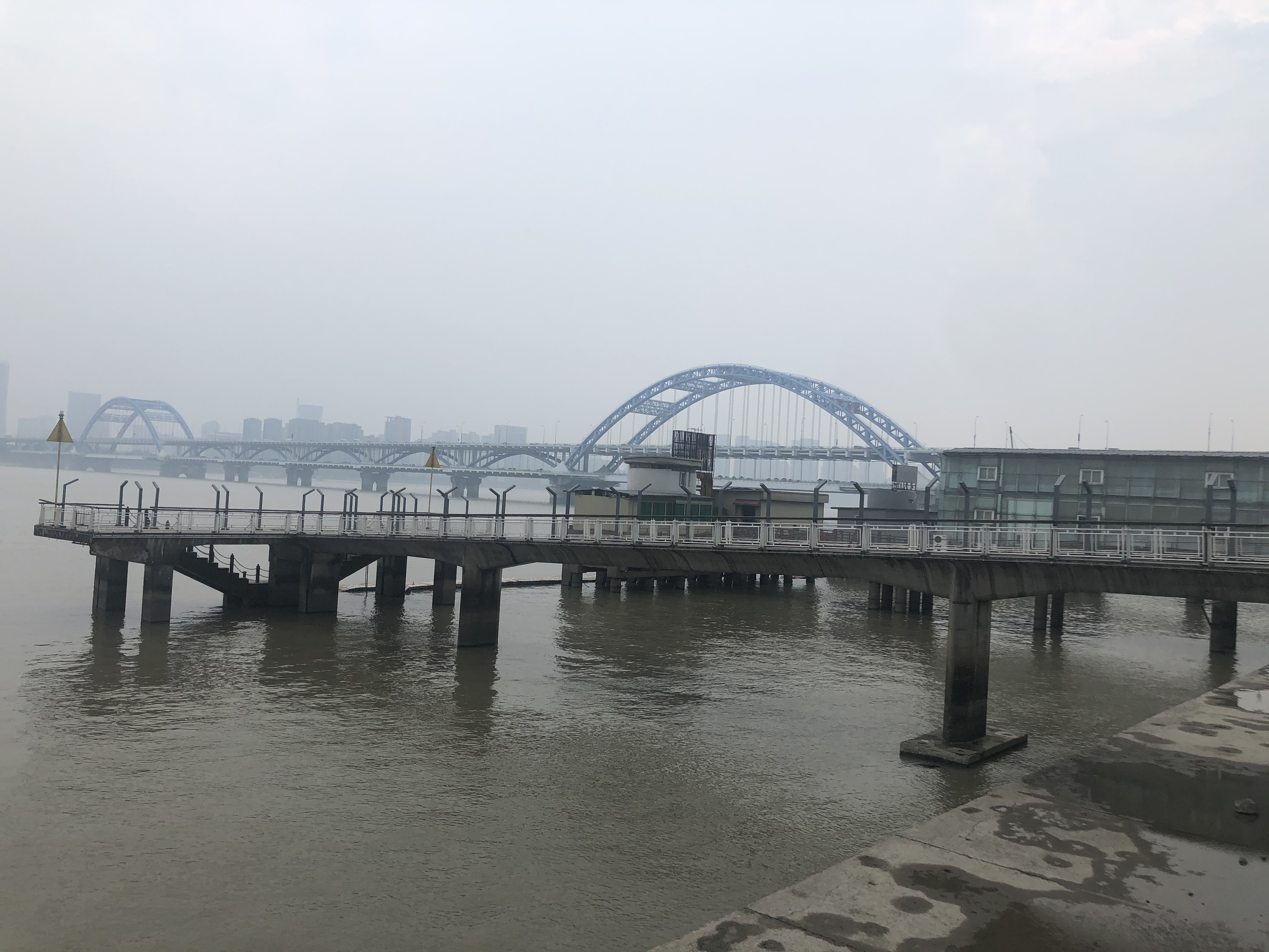 浙江第一码头景观